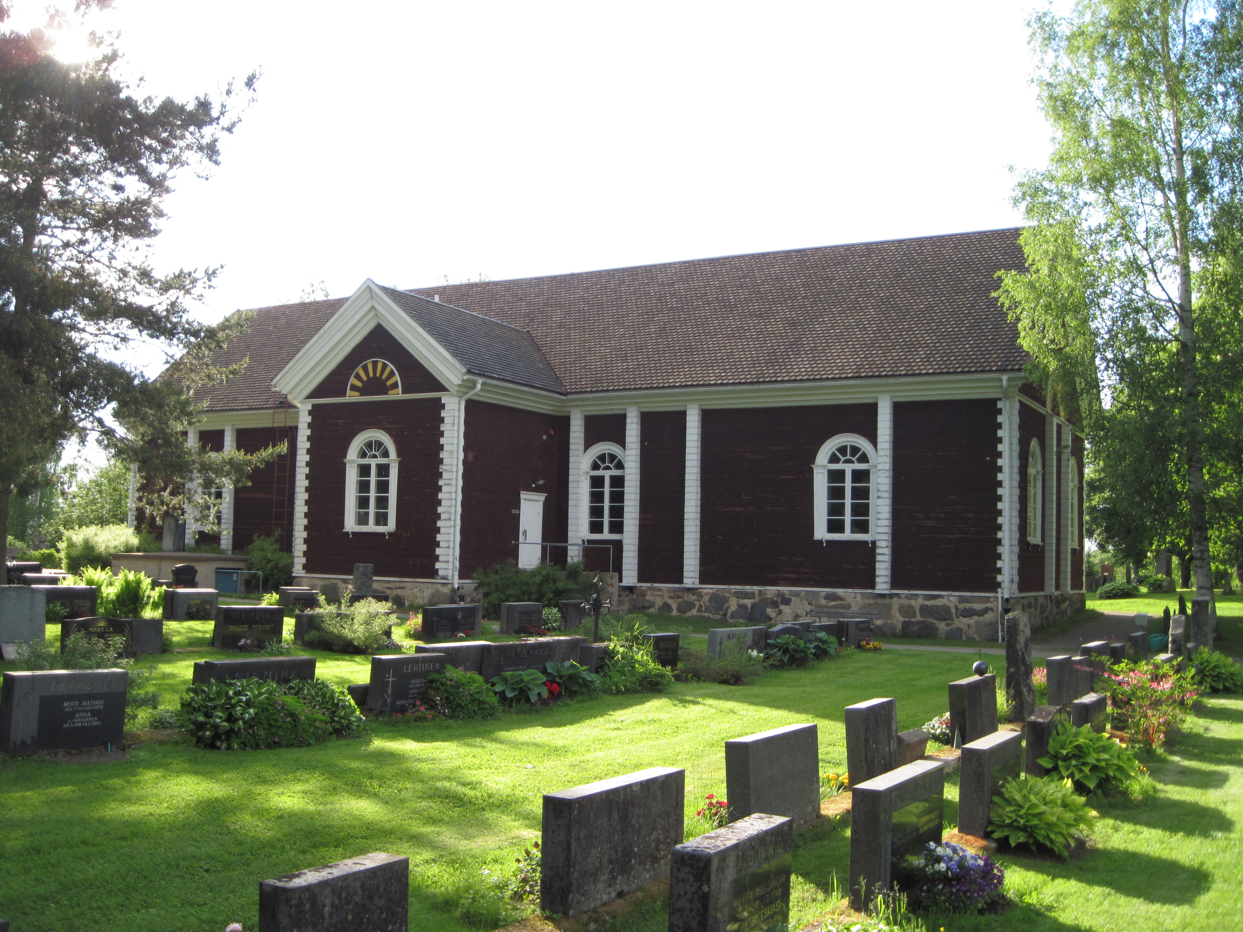 Tottijärven kirkko kesällä 2012